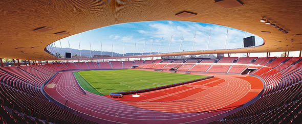 Der Letzigrund war einer der acht Austragungsorte zur EM 2008 Schweiz/Österreich.